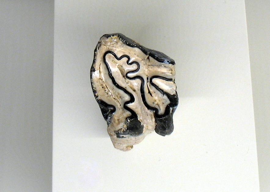 Molar superior (vista oclusal) de Hispanotherium matritense. Yacimiento paleontológico Fábrica Mahou, Madrid, España. Exposición temporal "La colina de los tigres dientes de sable. Los yacimientos miocenos del cerro de los Batallones (Torrejón de Velasco, Comunidad de Madrid)" en el Museo Arqueológico Regional (MAR), Alcalá de Henares (Madrid)